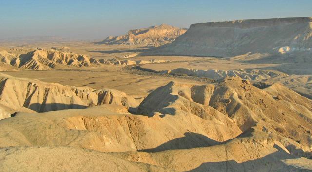 Negev-Wüst